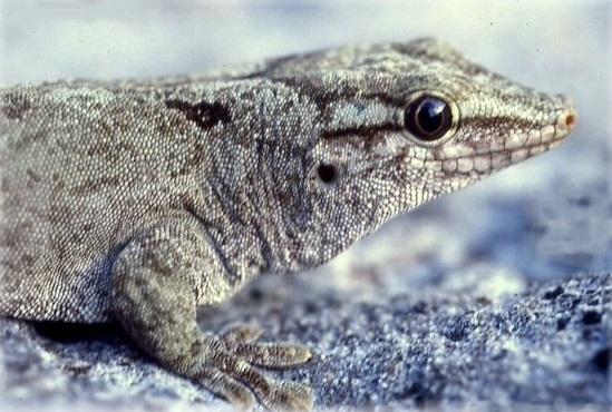 Phelsuma endémique (Phelsuma guentheri) de l'Ile Ronde, au nord de l'Ile Maurice Travail personnel Mai 1986